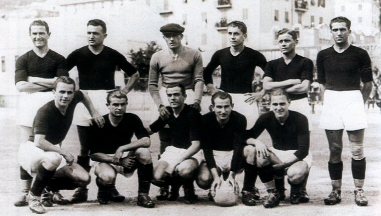 Foot Ball Club Torino 1935-36